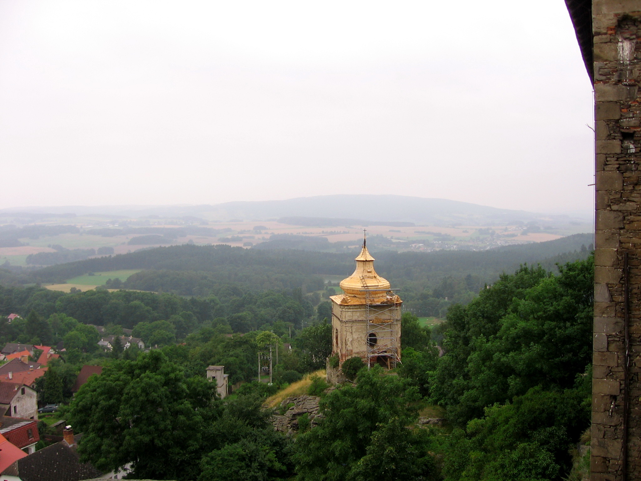 Zřícenina hradu Lipnice nad Sázavou